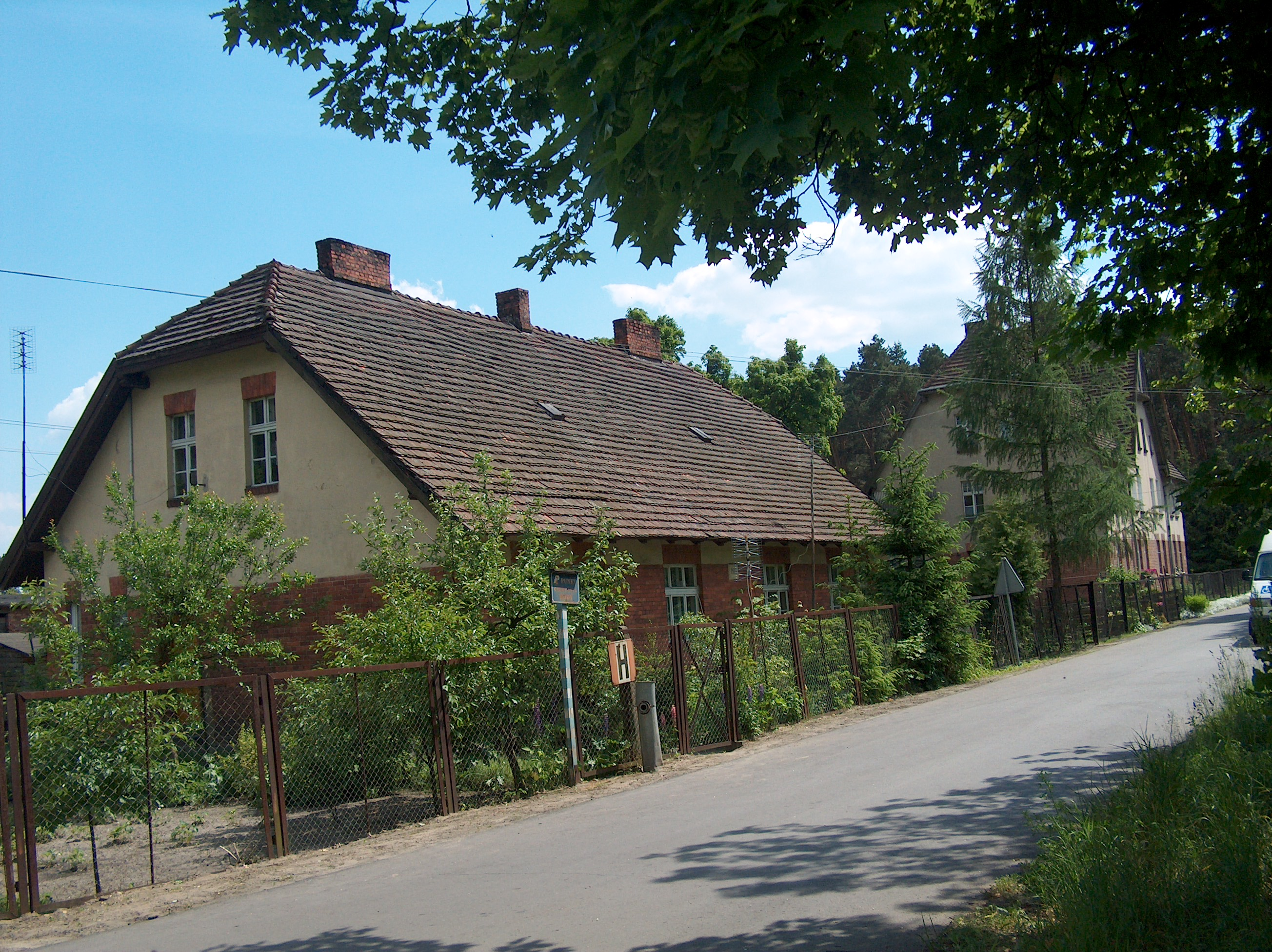 autor: Jacek Krzyżyński. Mój własny plik i przekazuję autorstwo jako własnosc publiczna Fotografowałem budynki Otłoczyna w 2004 roku z zamiarem otworzenia własnej strony z historią Otłoczyna. Do tej pory tego nie zrobiłem. Przesłane teraz pliki umieszczę na stronie otłoczyna w encyklopedii Wikipedia